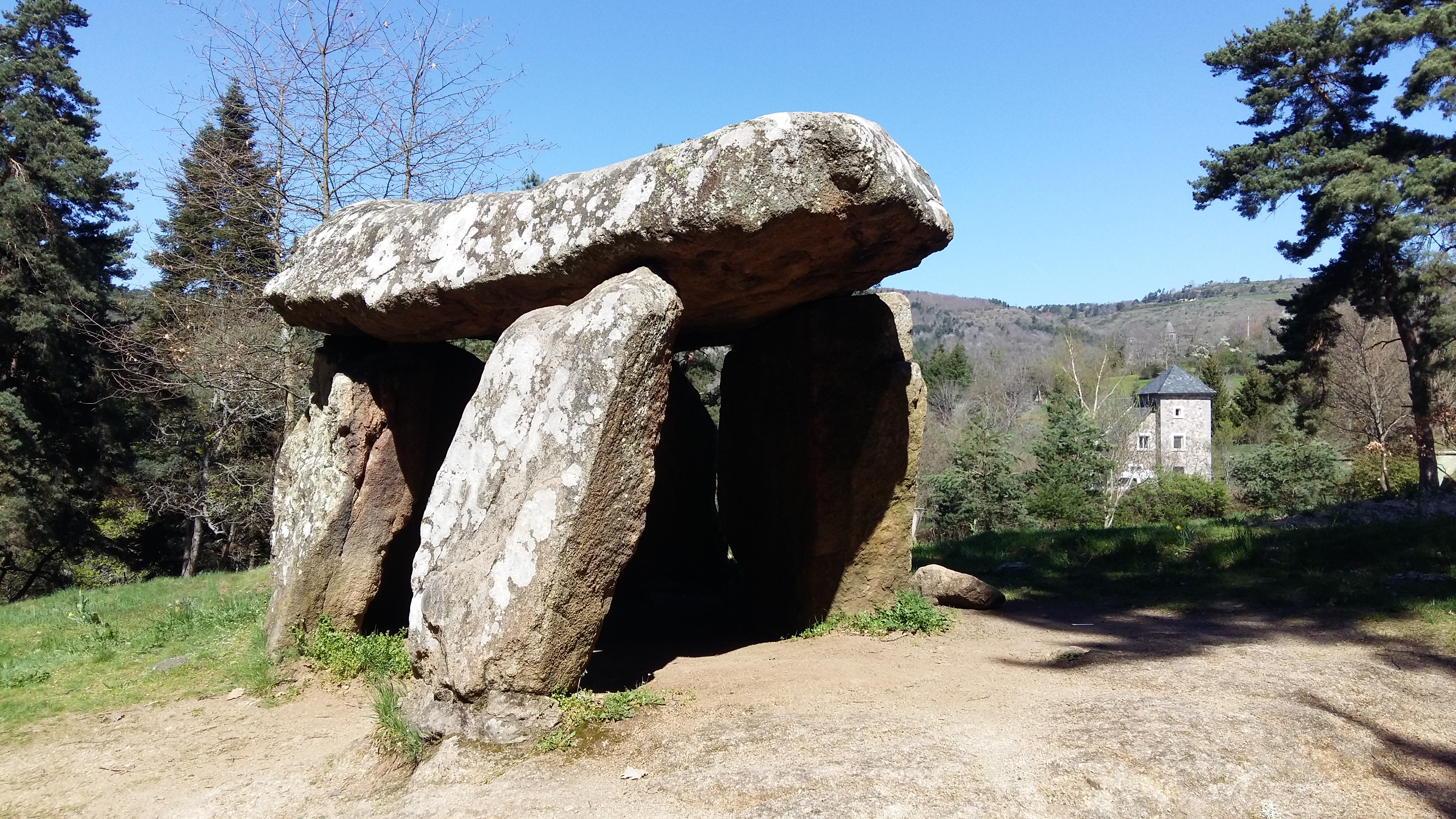 Dolmen du Parc à Saint-Nectaire-le-Bas, commune de Saint-Nectaire, département du Puy-de-Dôme, France.